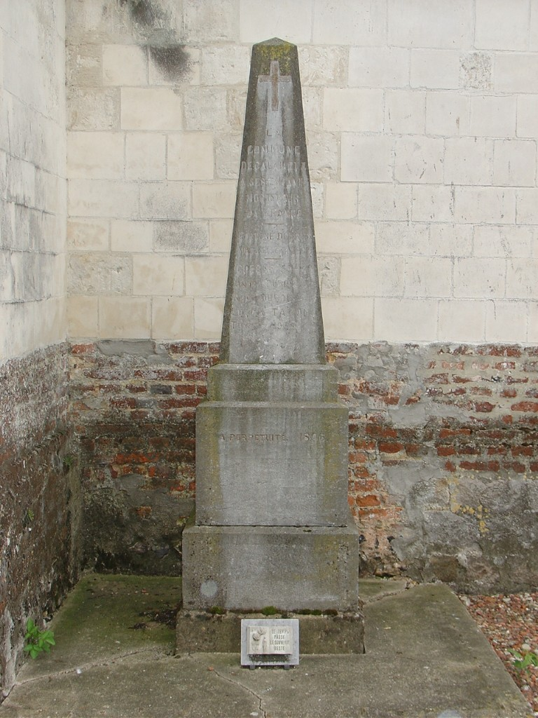 Monument aux morts de Galametz